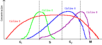 Expresión diferencial de ciclinas en el ciclo celular; deriva de Image:Cyclinexpression waehrend Zellzyklus.png